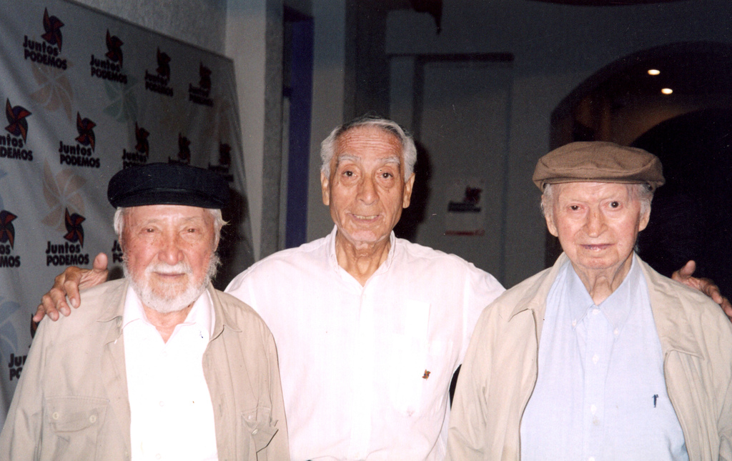 Los dirigentes comunistas Luis Corvalán, Ernesto Araneda y Volodia Teitelboim.